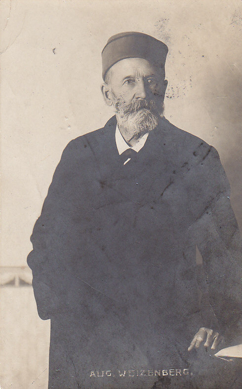 Аугуст Вейценберг, скульптор